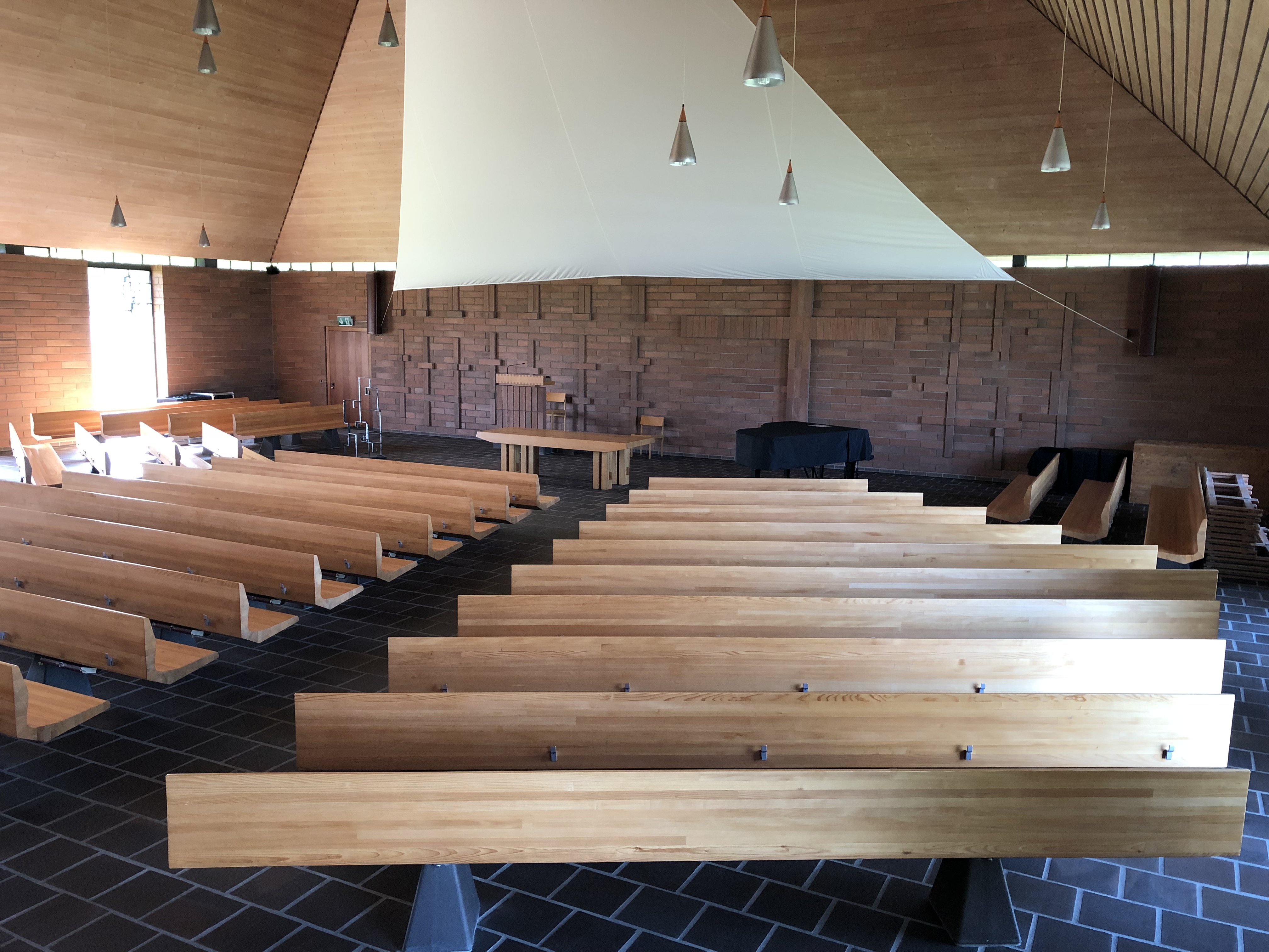 Zollikon: reformierte Kirche Zollikerberg; innen